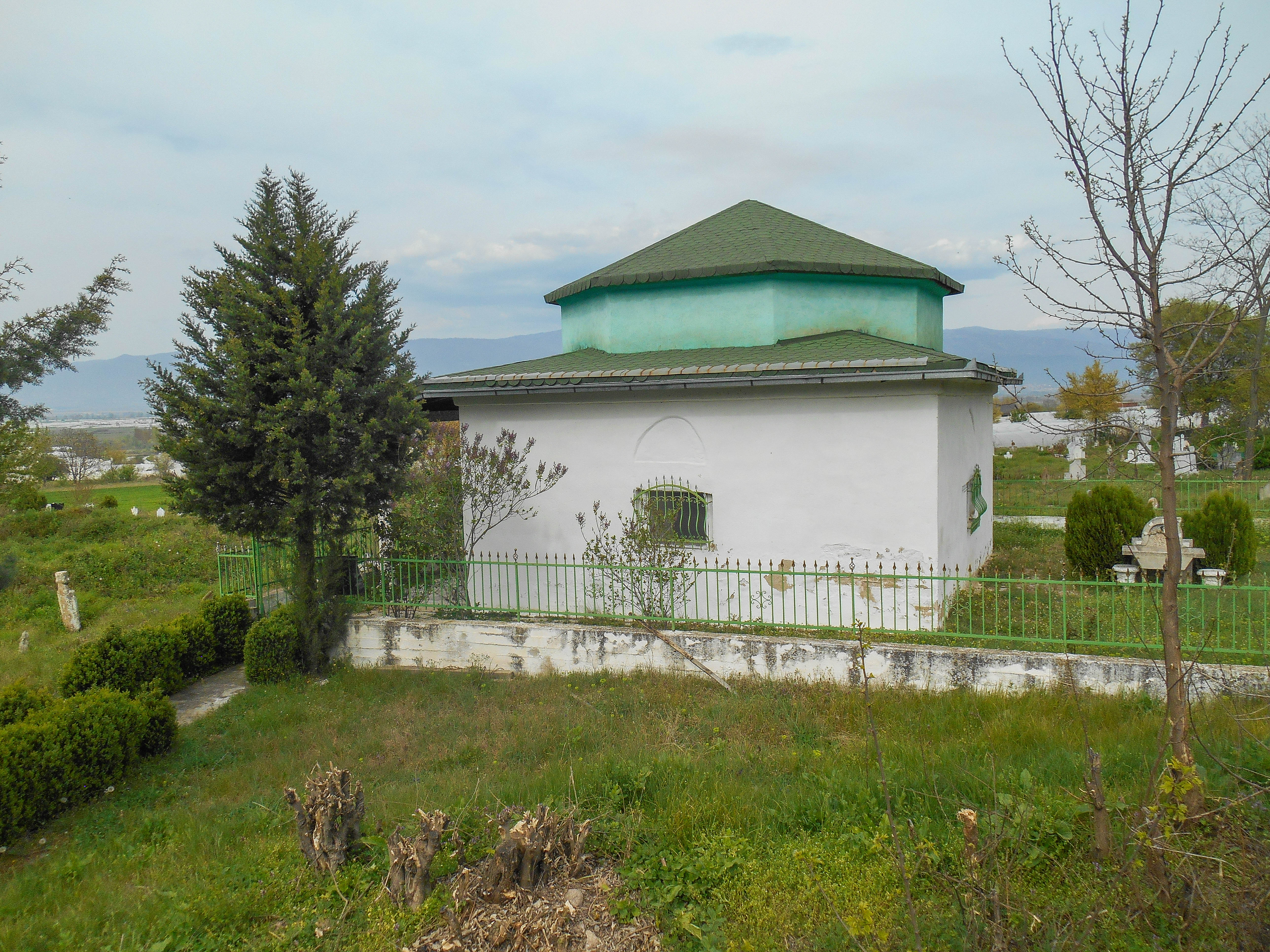 Старата џамија во селото